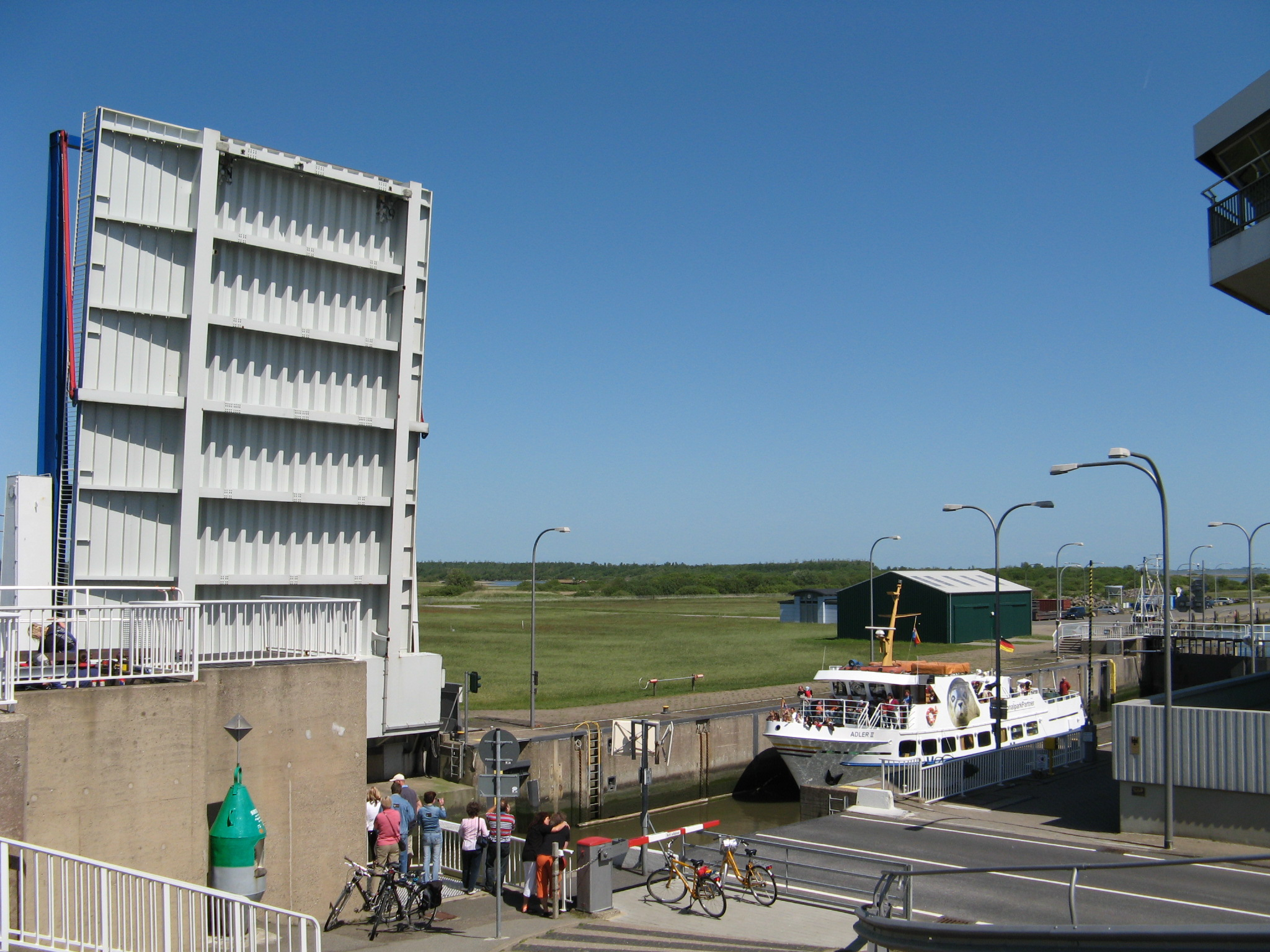 Eidersperrwerk